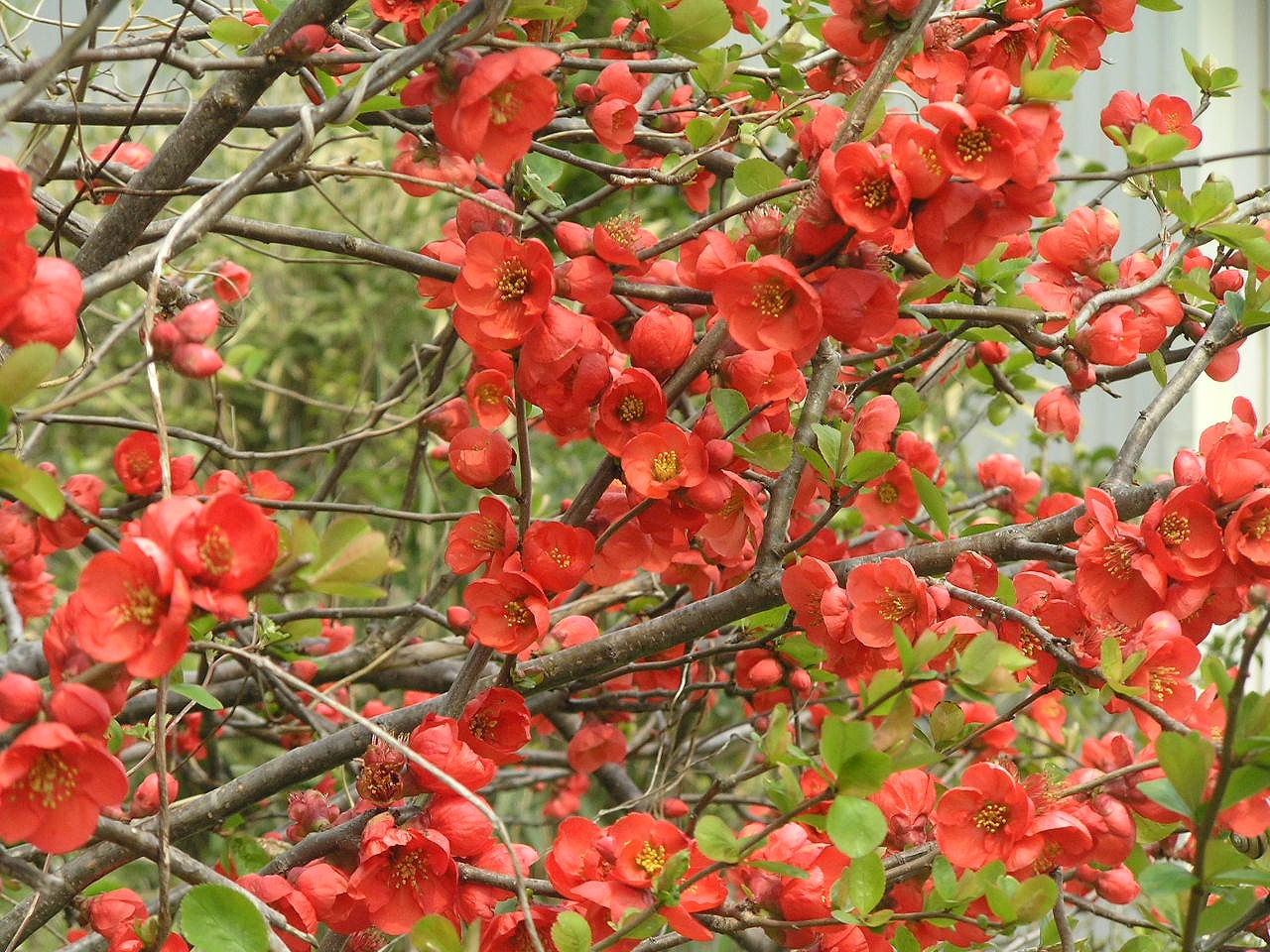 満開のボケの花